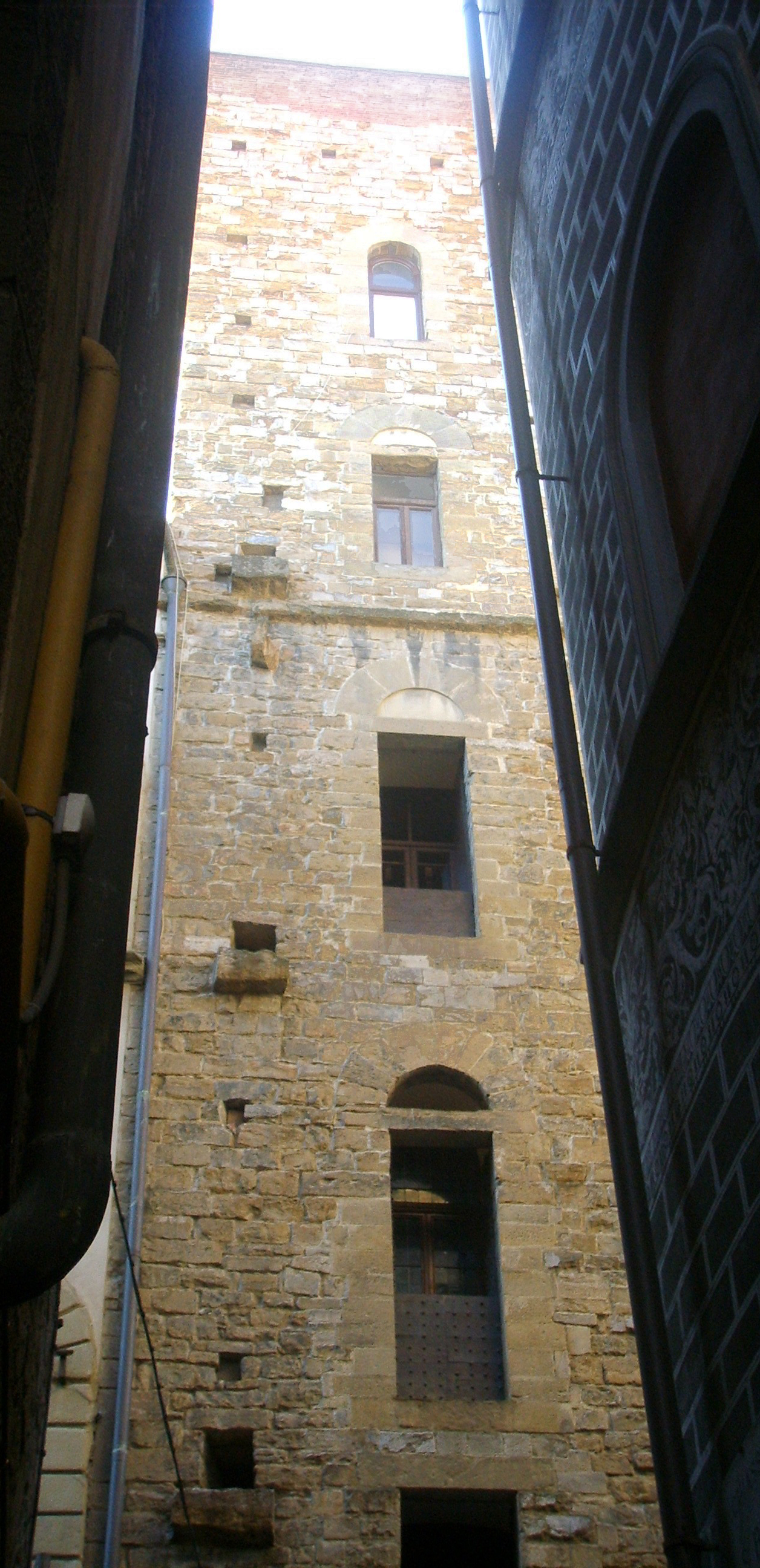 Torre_dei_buondelmonti in Florence, italy